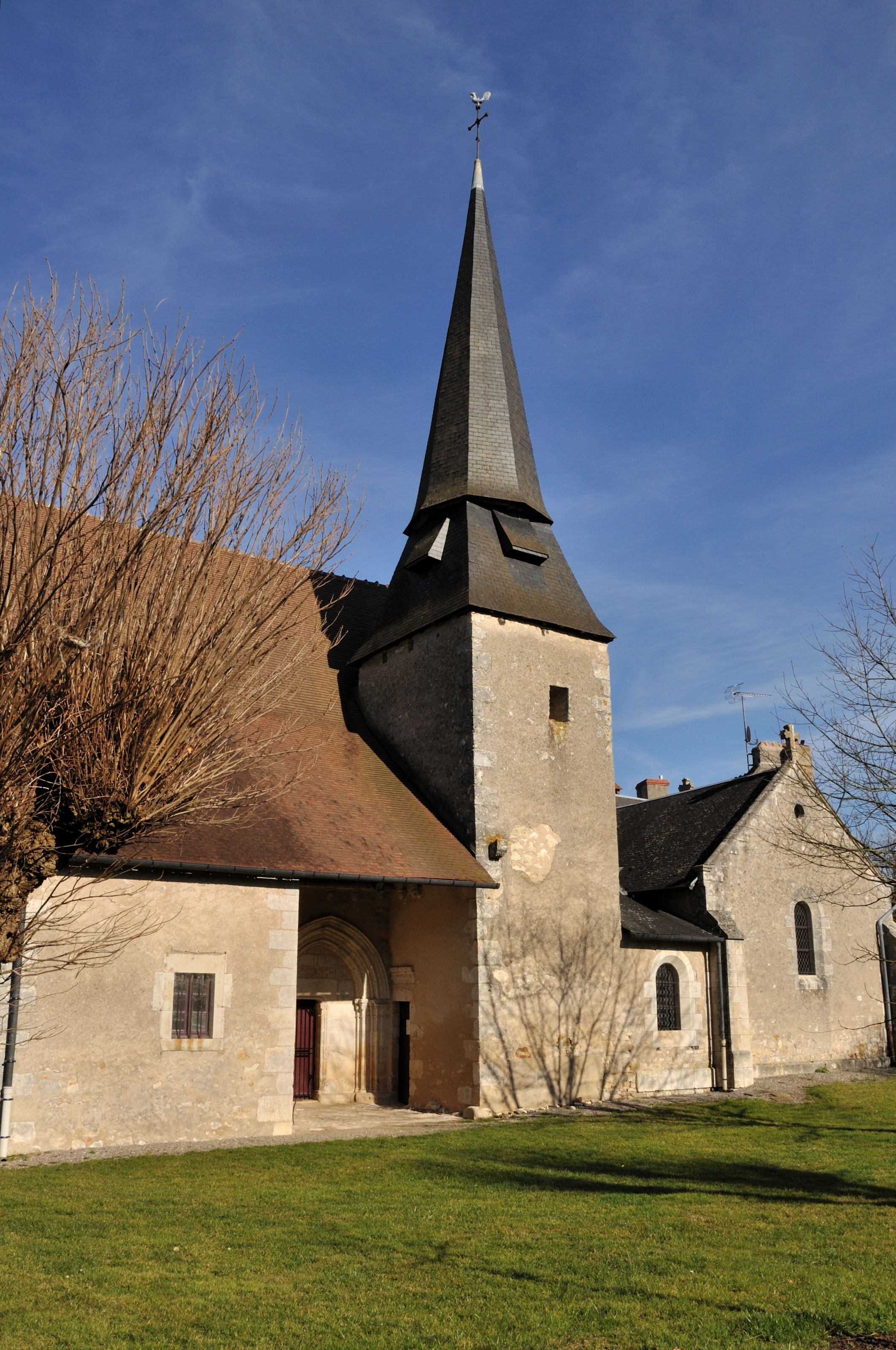 Chalais (Indre) - Eglise